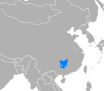 Idioma xiang